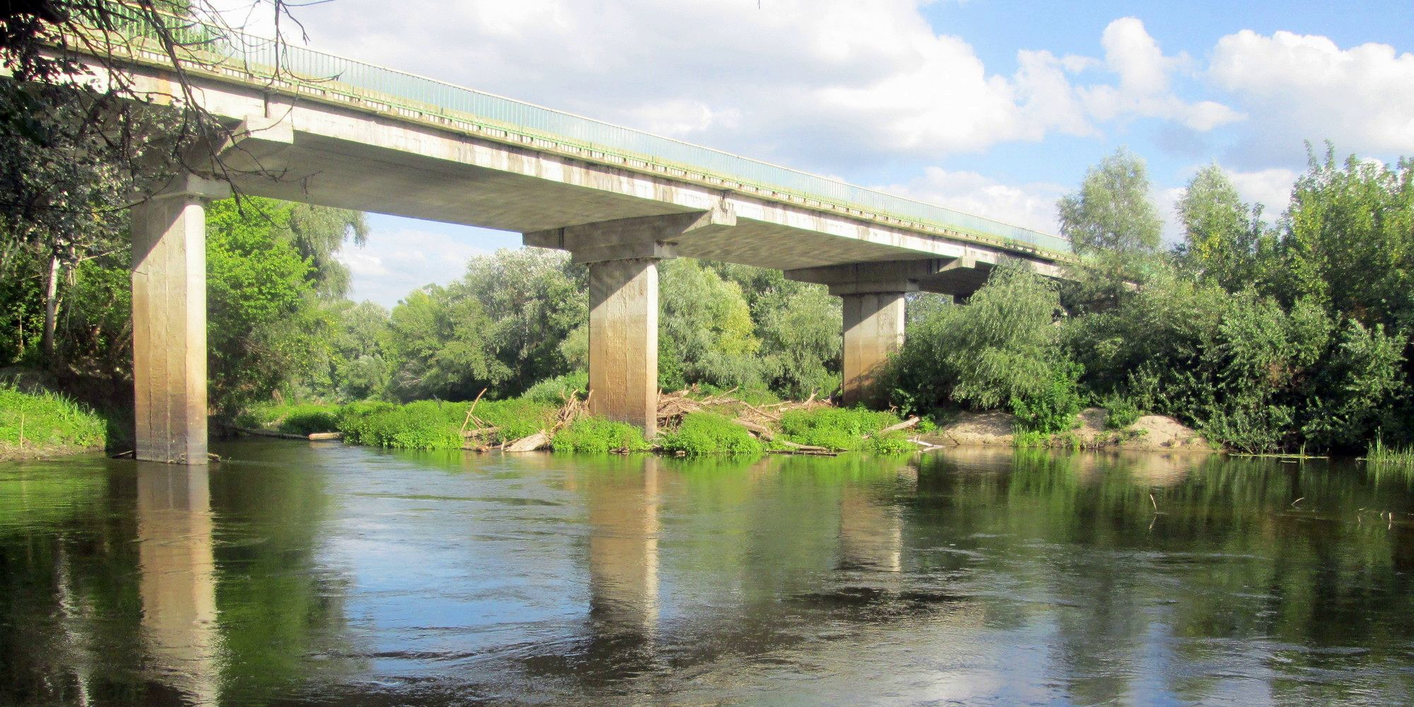 Міст через річку Псел у селі Манжелія (Глобинський район, Полтавська область, Україна). Вигляд з правого берега проти течії.